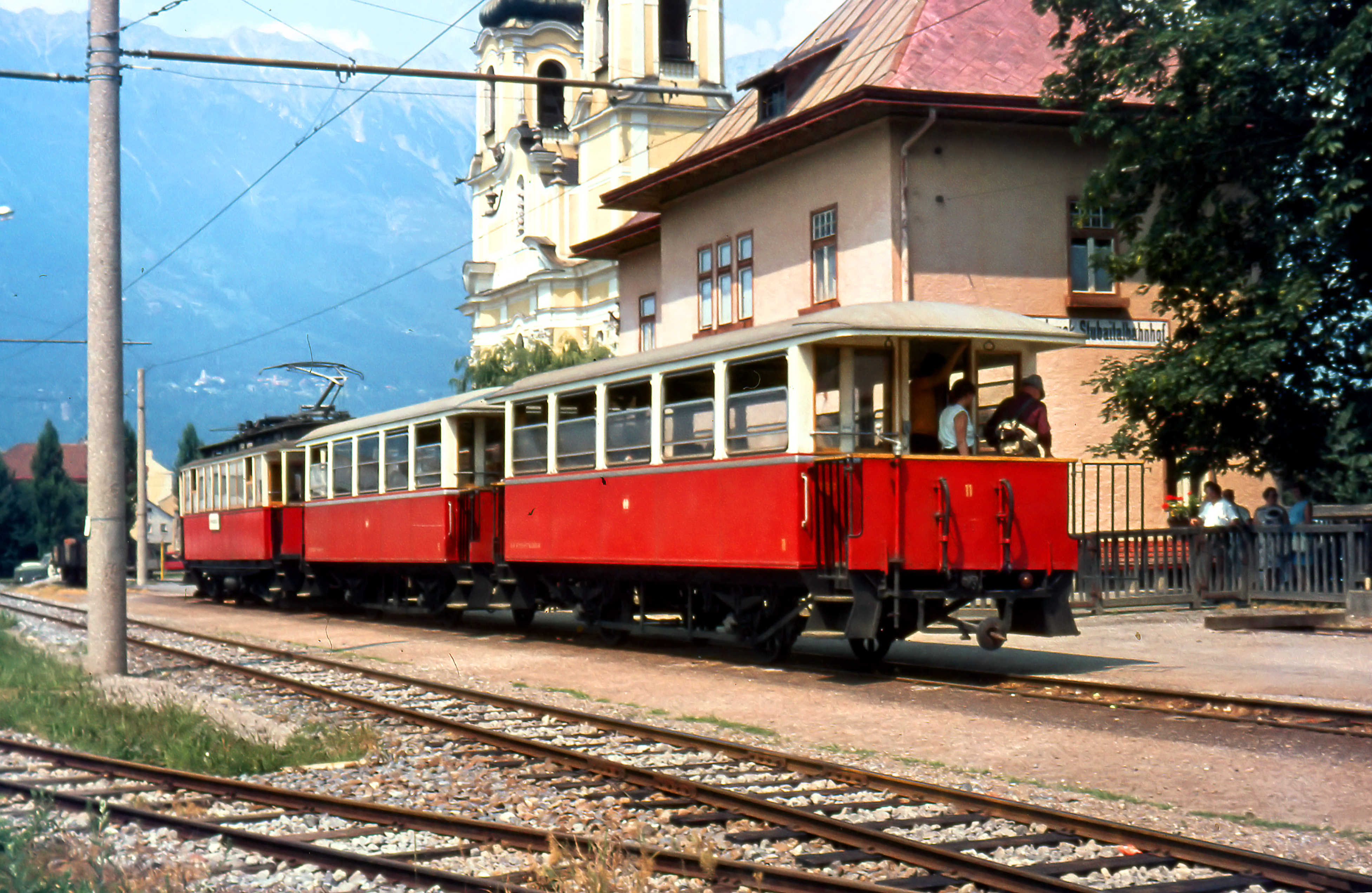 Stubaitalbahn Triebwagen (vermutlich Nr. 3) ist mit einem Zug am 2. Juli 1972 aus Fulpmes in Innsbruck Stubaitalbahnhof angekommen.